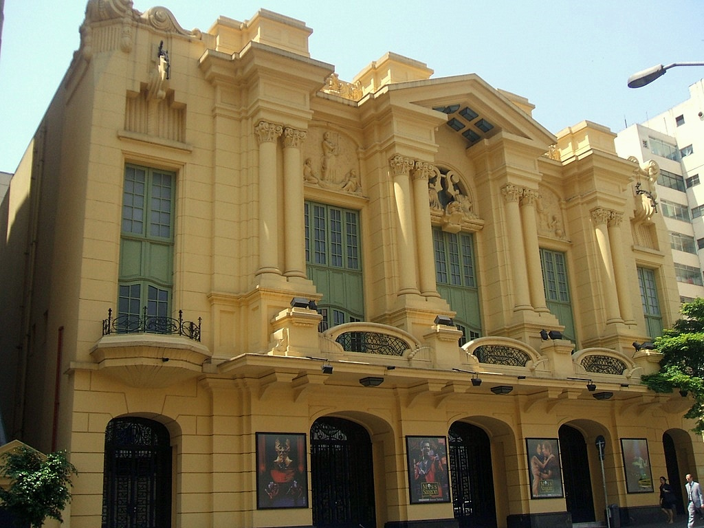 Teatro Abril (antigo Teatro Cine-Paramount) na Av. Brigadeiro Luís Antônio, em São Paulo, Brasil